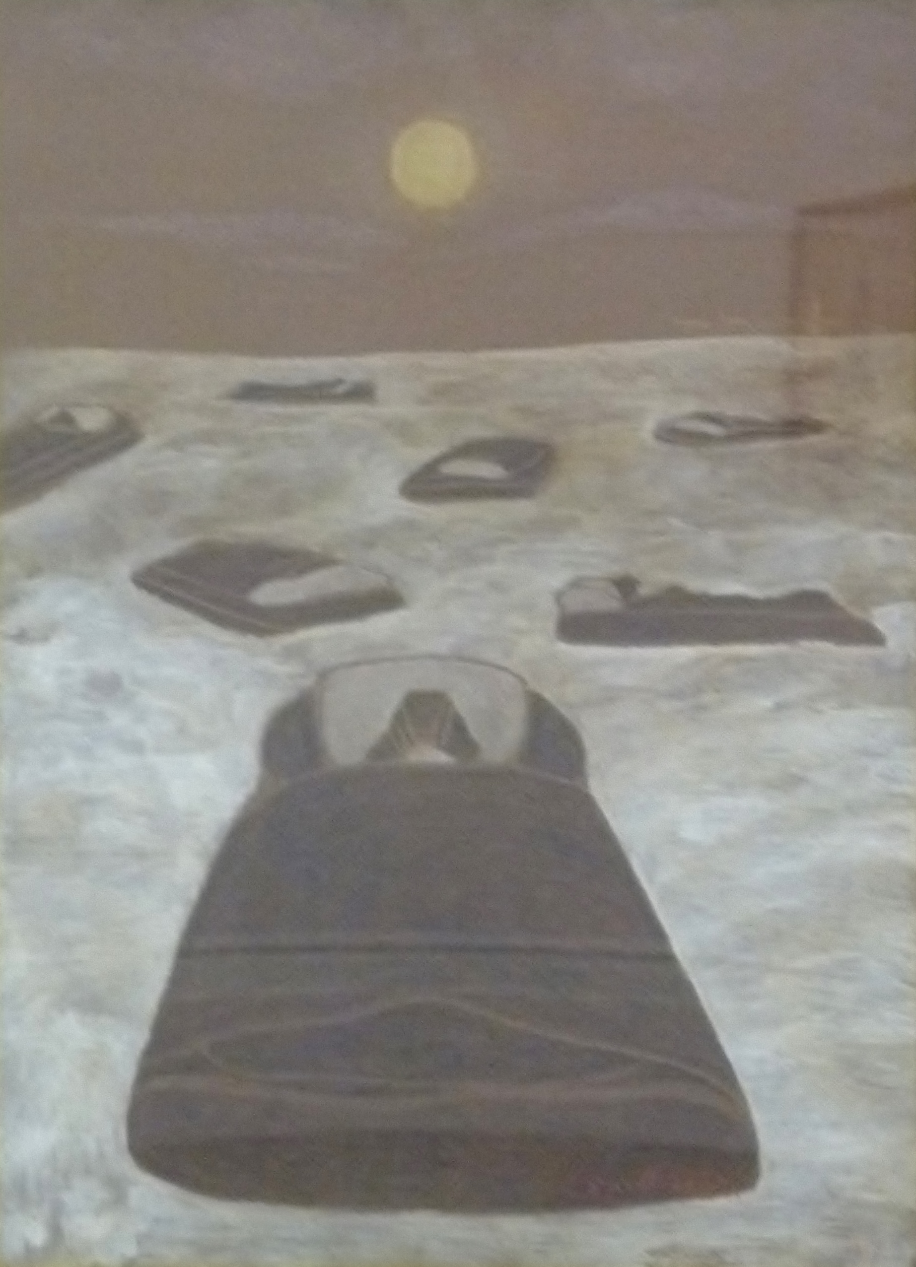 "Serres Chaudes" (1917); gouache, zwart krijt, kleurpotlood op papier (68 x 49,5 cm) door de Belgische kunstschilder Léon Spilliaert (1881-1946); privéverzameling